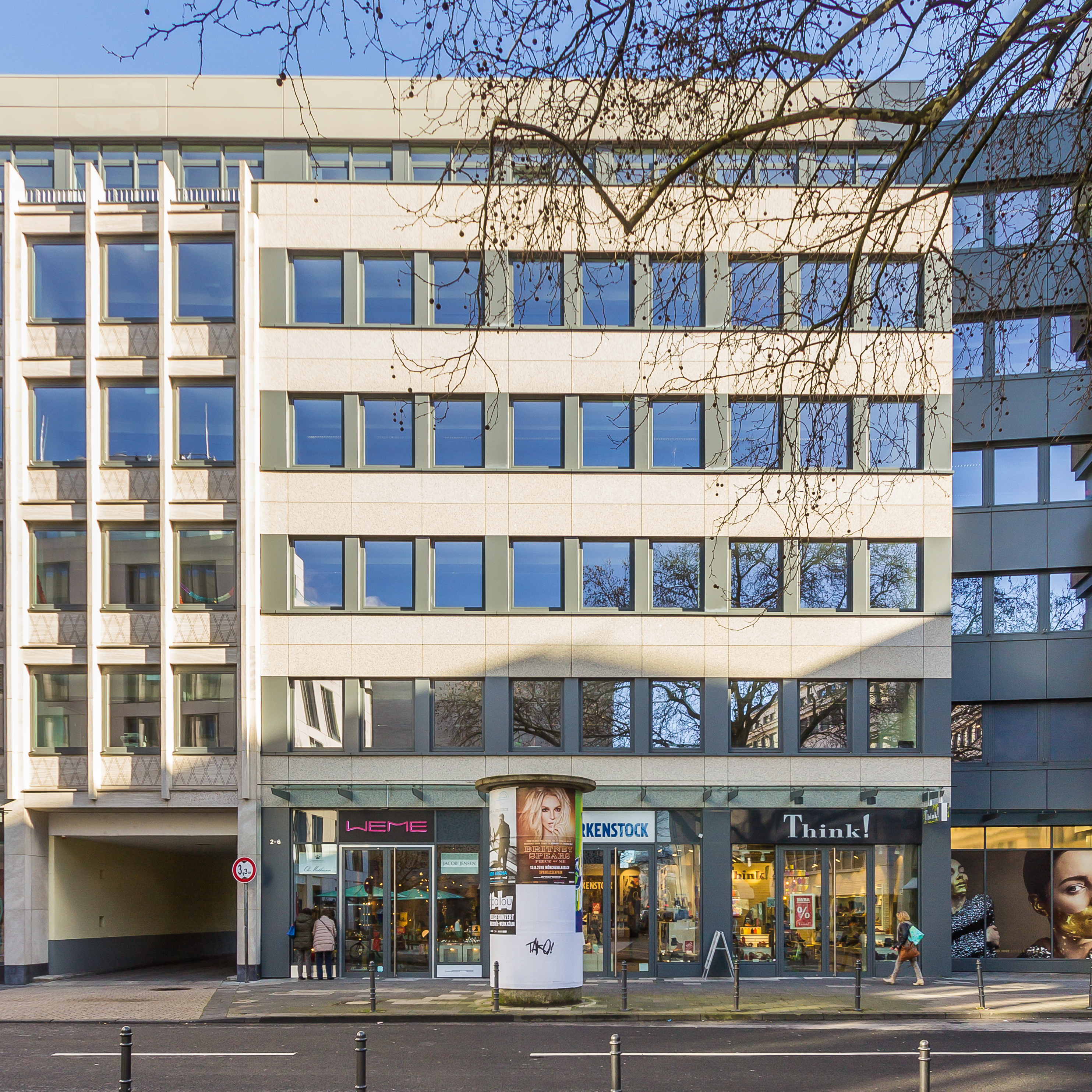 Büro- und Geschäftshaus Ludwigstr 6 - Erweiterungsbau (von 1969)